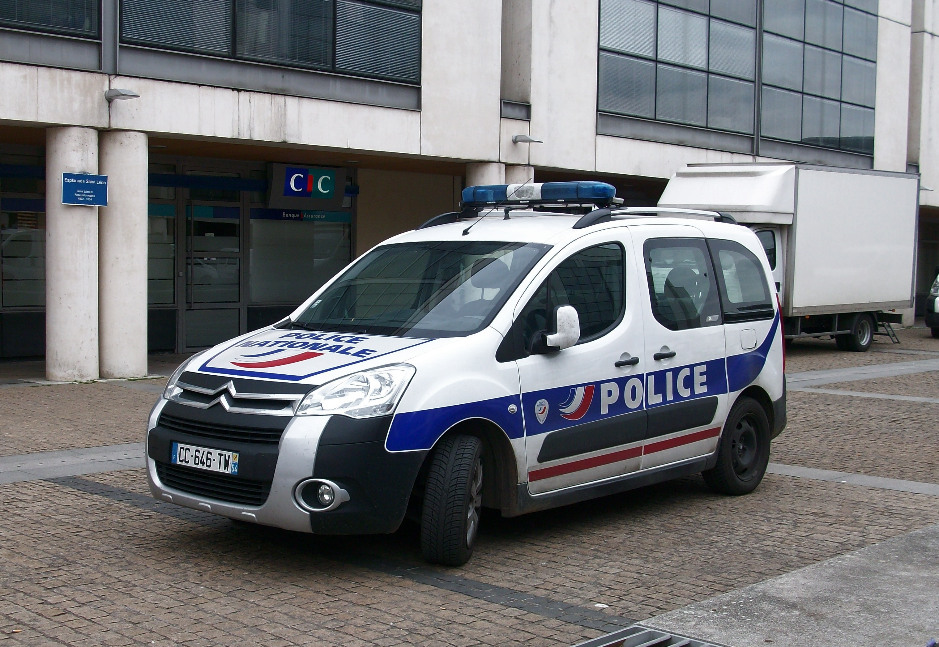 Véhicule de la police nationale à Nancy